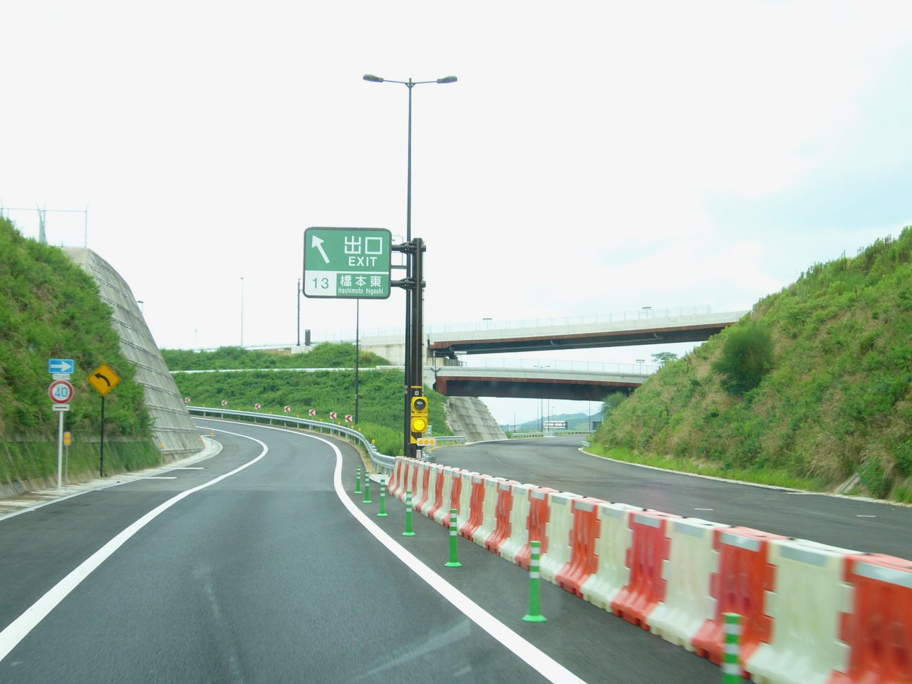 京奈和自動車道（橋本道路） 橋本東インターチェンジ 和歌山方面出口 右手に未開通の和歌山方面への道路が見える